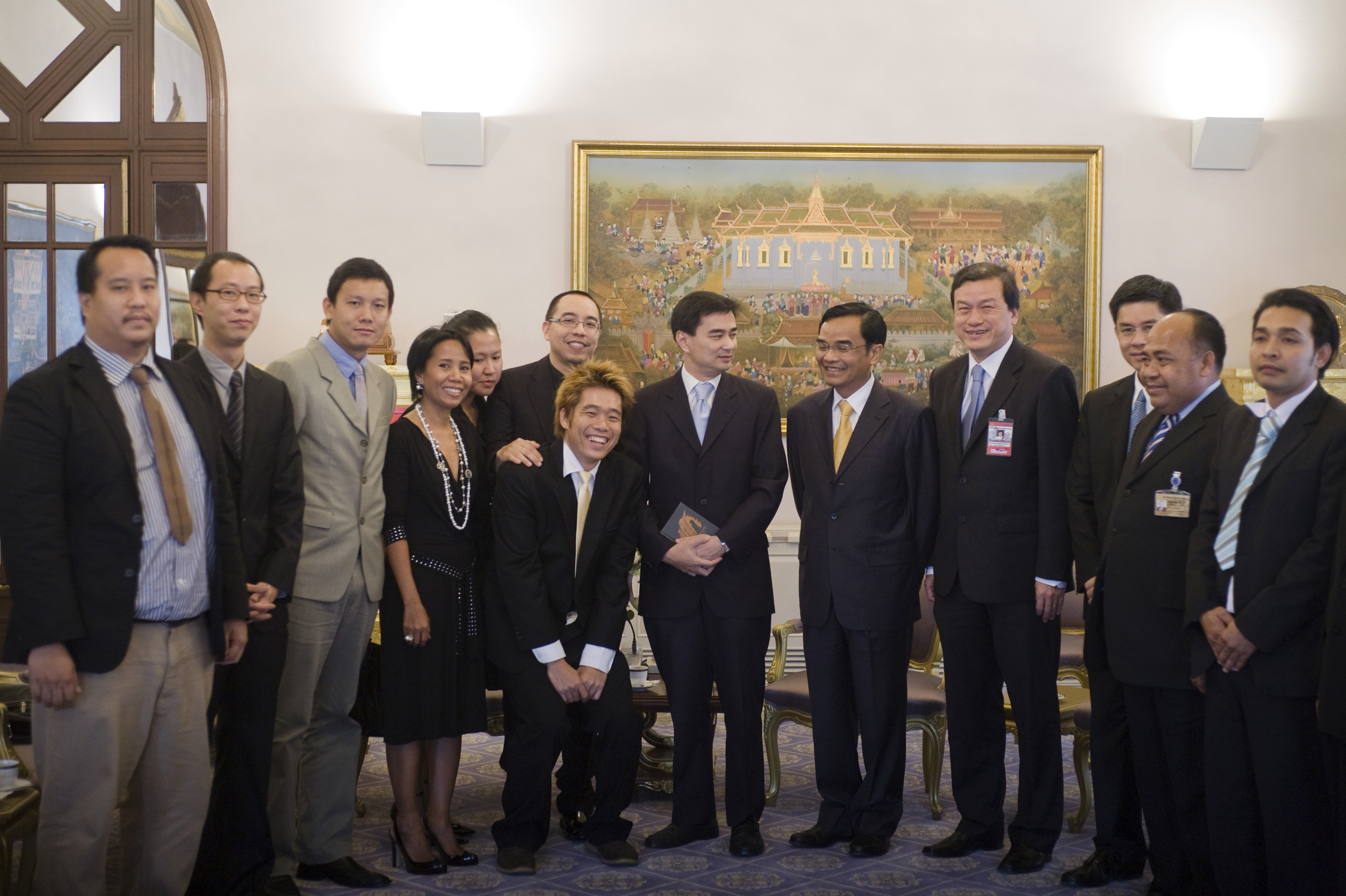 รัฐมนตรีว่าการกระทรวงวัฒนธรรม นำ นายอภิชาตพงศ์ วีระเศรษฐกุล ผู้กำกับภาพยนตร์ พร้อมทีมงานผู้ผลิตภาพยนตร์ "ลุงบุญมีระลึกชาติ" เข้าเยี่ยมคารวะ นายกรัฐมนตรี ณ ห้องสีม่วง ตึกไทยคู่ฟ้า ทำเนียบรัฐบาล วันที่ 10 มิถุนายน 2553 (The Official Site of The Prime Minister of Thailand Photo by พีรพัฒน์ วิมลรังครัตน์)